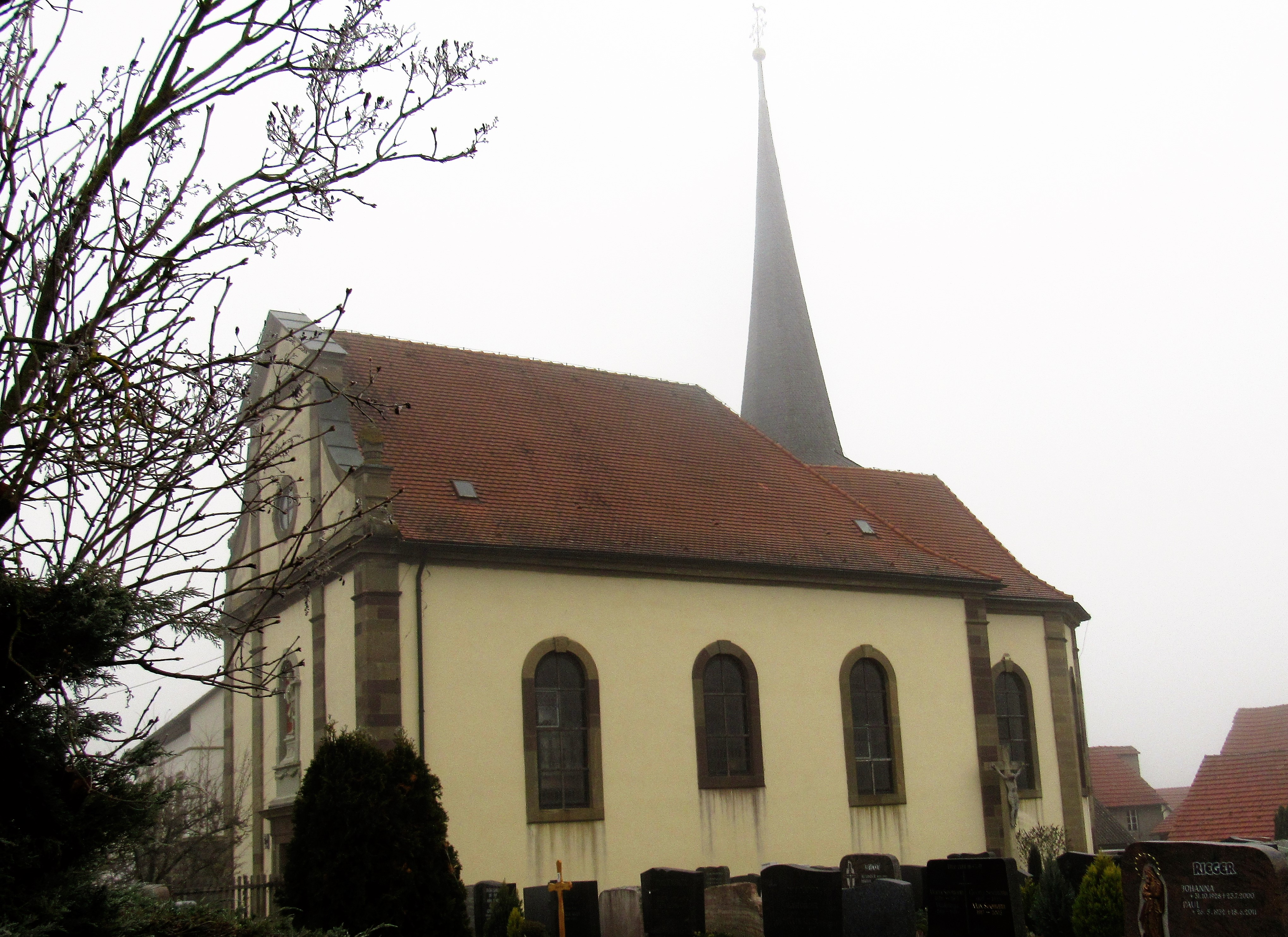 Die Kirche in Sömmersdorf